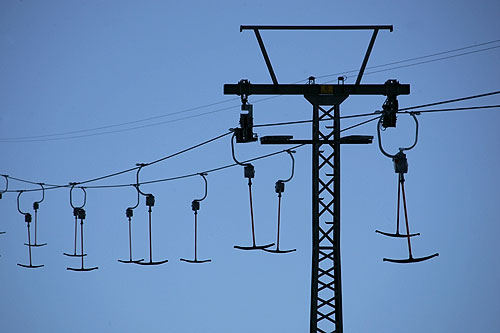 Skilift auf dem Leiterli